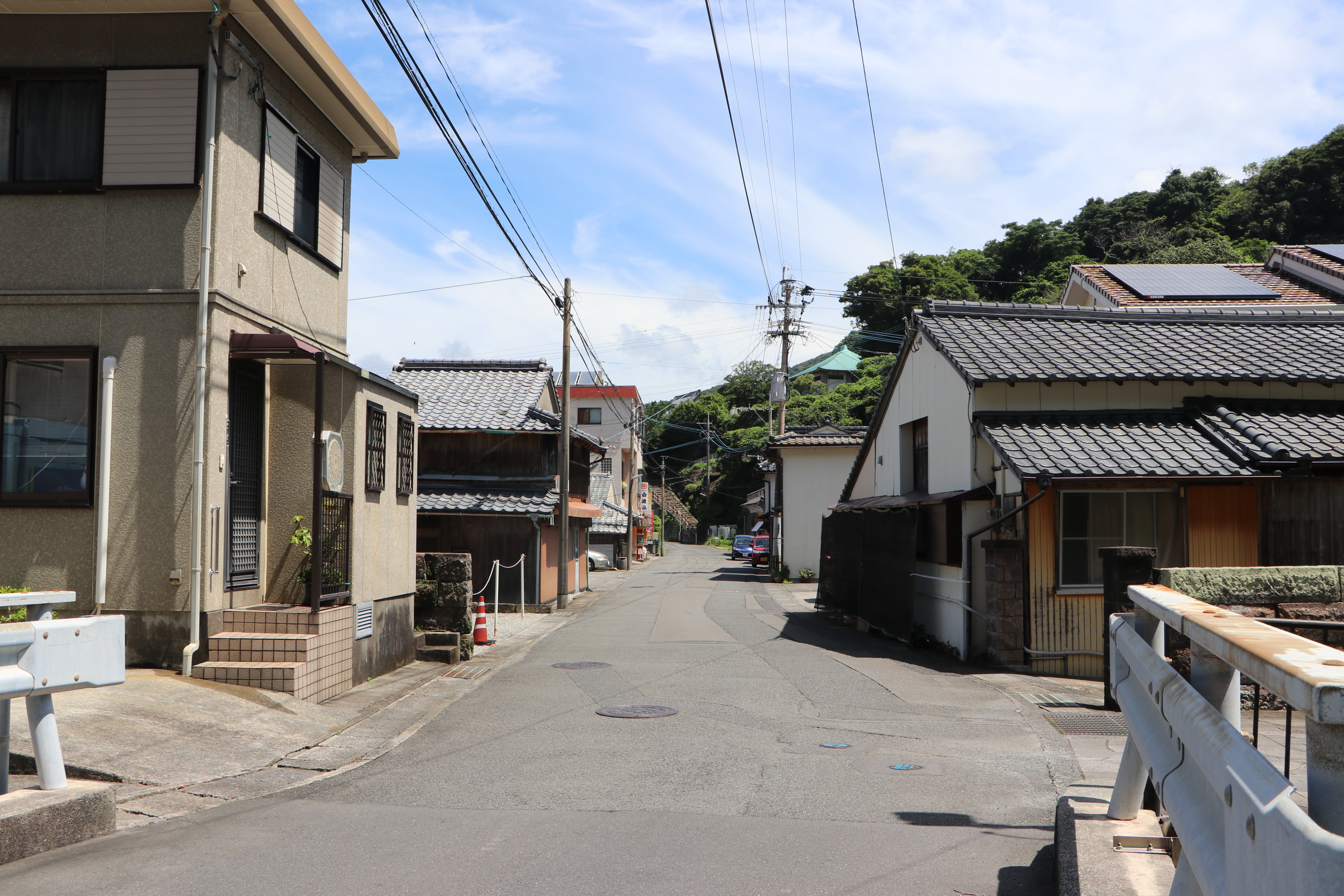 坊津の港町を通る鹿児島県道268号寺ヶ崎坊線